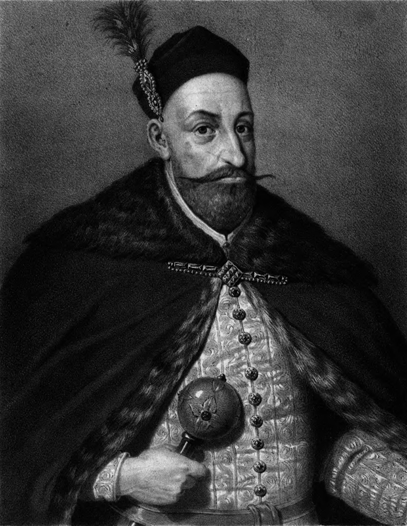 Беларуская (тарашкевіца): Партрэт Крыштапа Мікалая Радзівіла «Перуна» (Kryštap Mikałaj Radzivił «Piarun»)